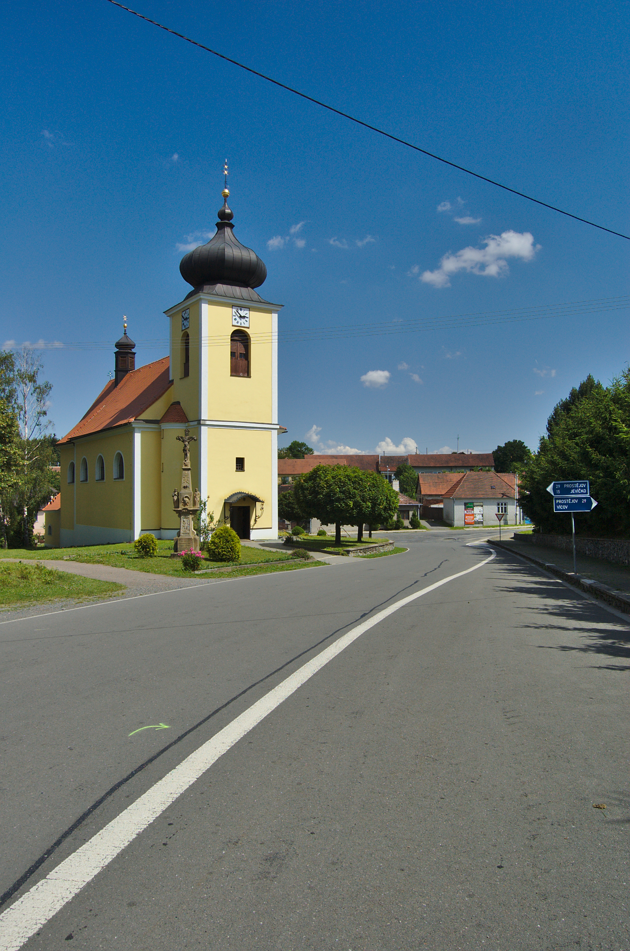 Kostel svatého Vavřince, Horní Štěpánov, okres Prostějov